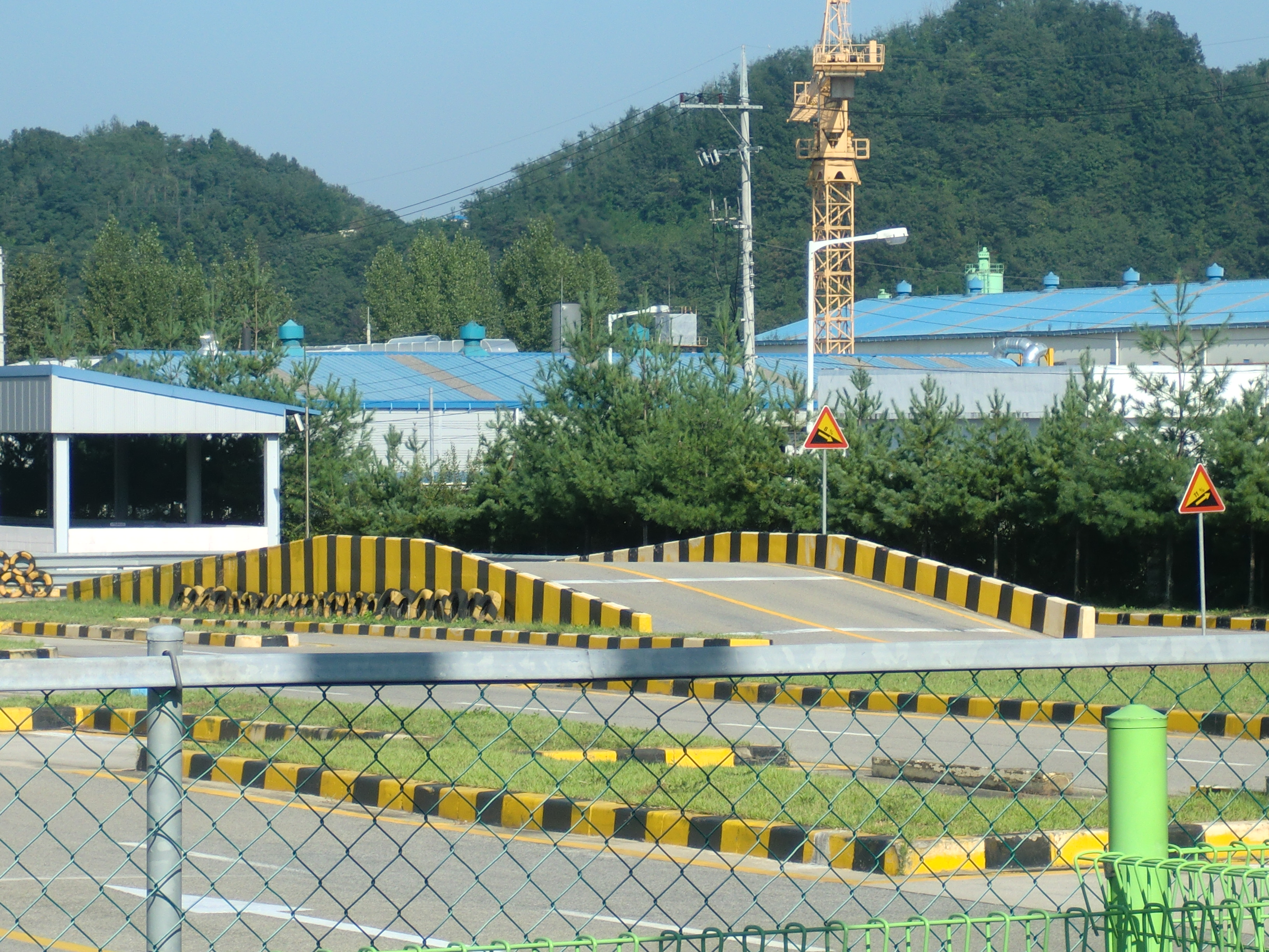 문경운전면허시험장 보통코스 경사로